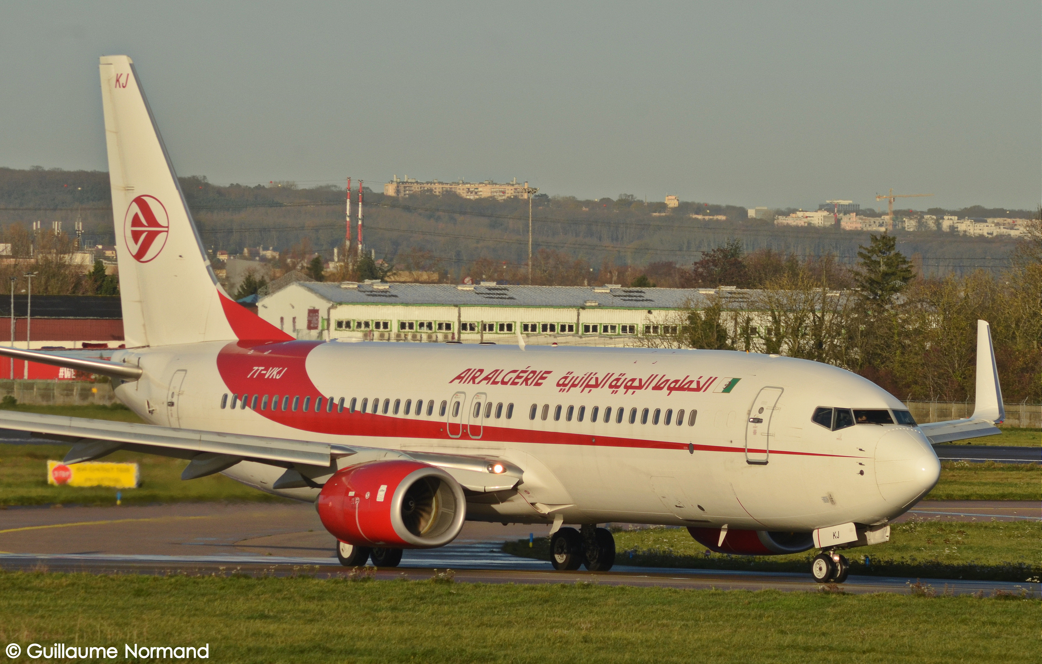 Boeing 737-8D6 Air Algérie 7T-VKJ